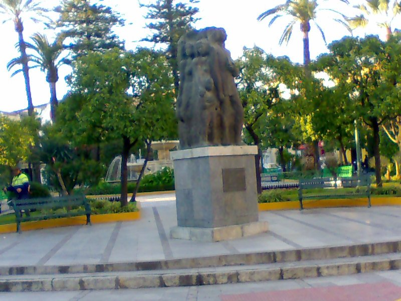 Monumento al rey Juan Carlos (Dos Hermanas)